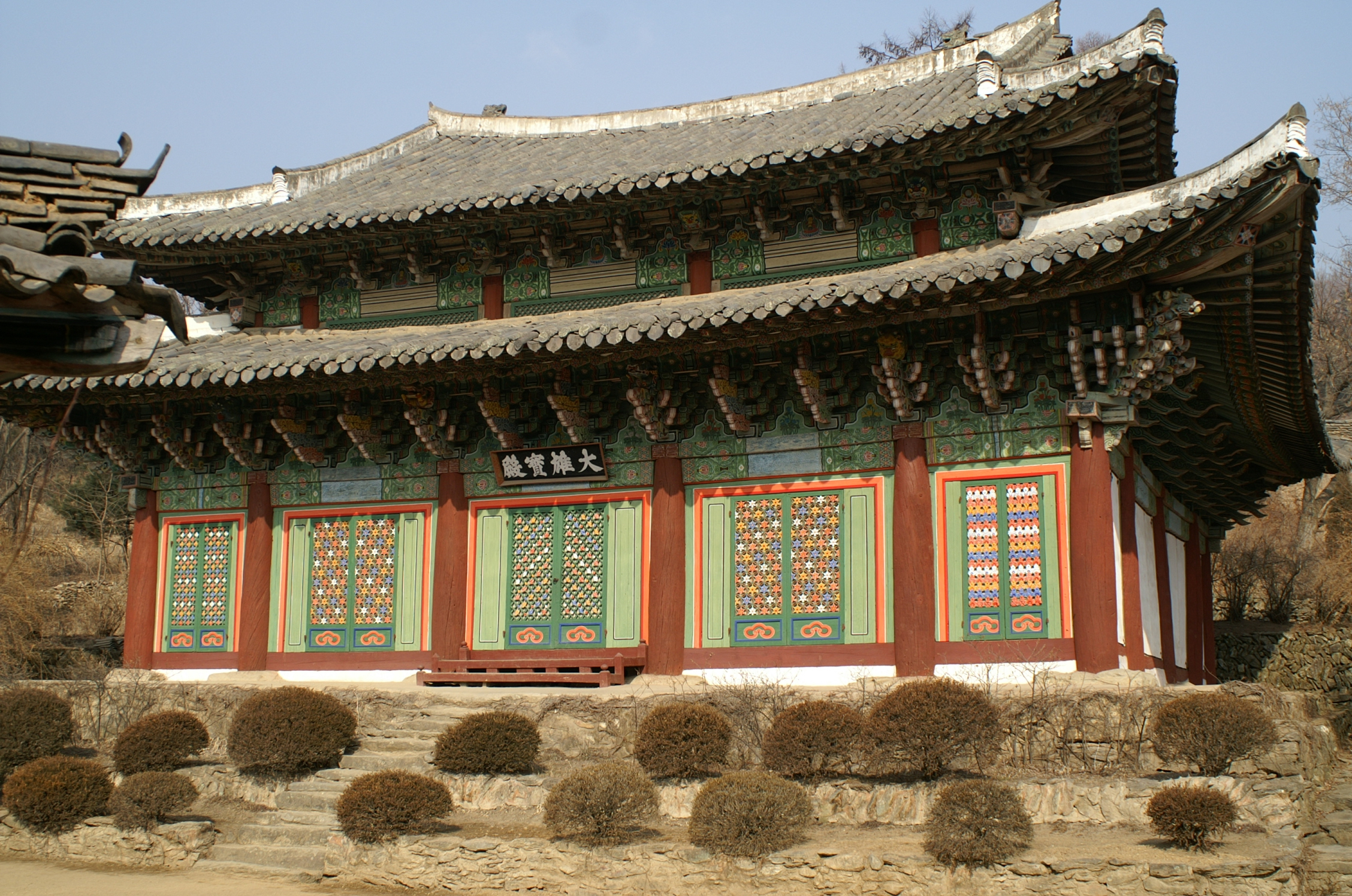 Taeungbo-jŏn, An'guk-sa